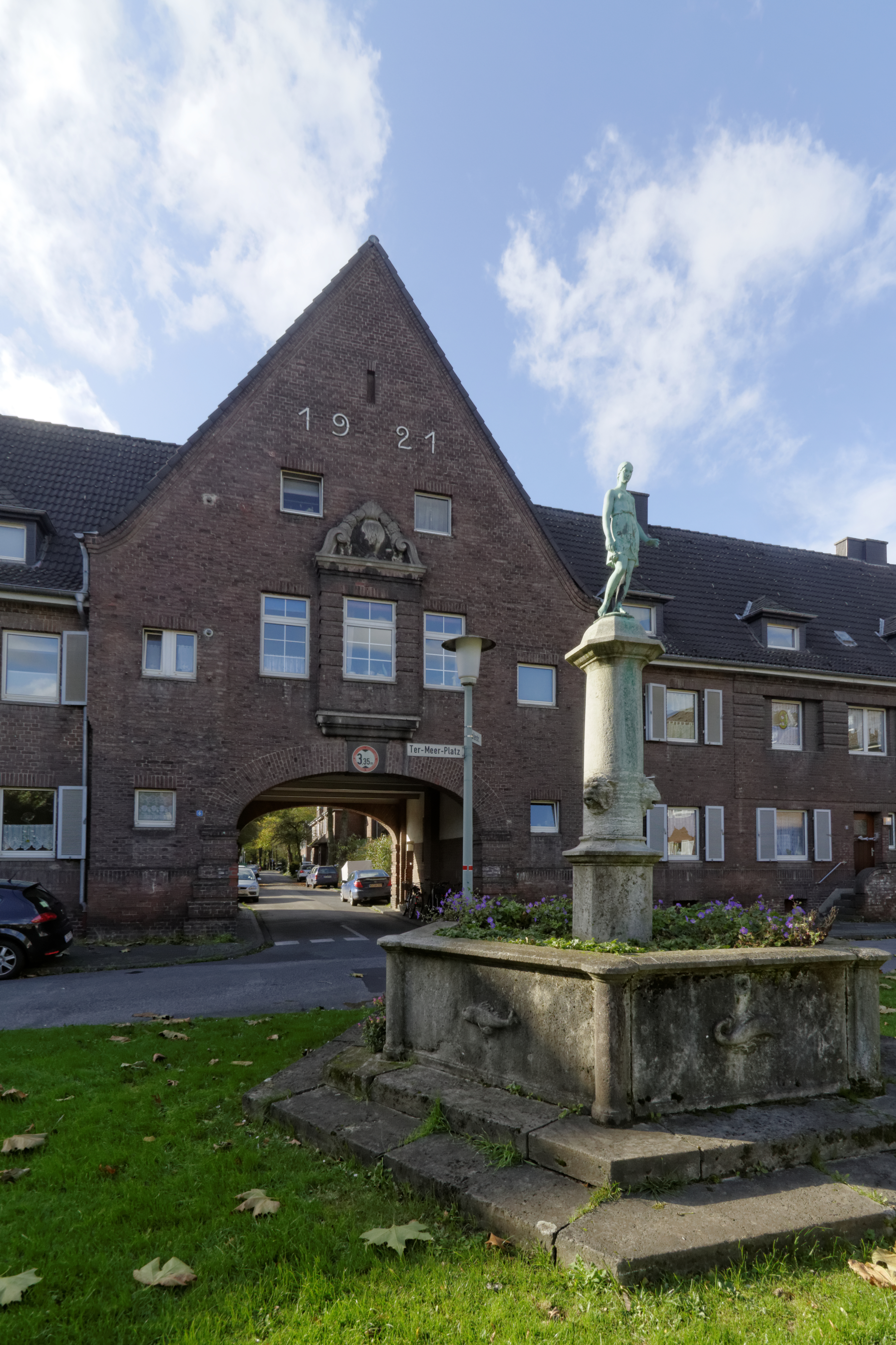 Krefeld, Ter-Meer-Platz_7